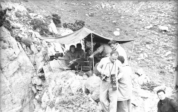 Max Cosyns gindaxaren kontroletan, Marcel Loubensen istripuaren egunean.